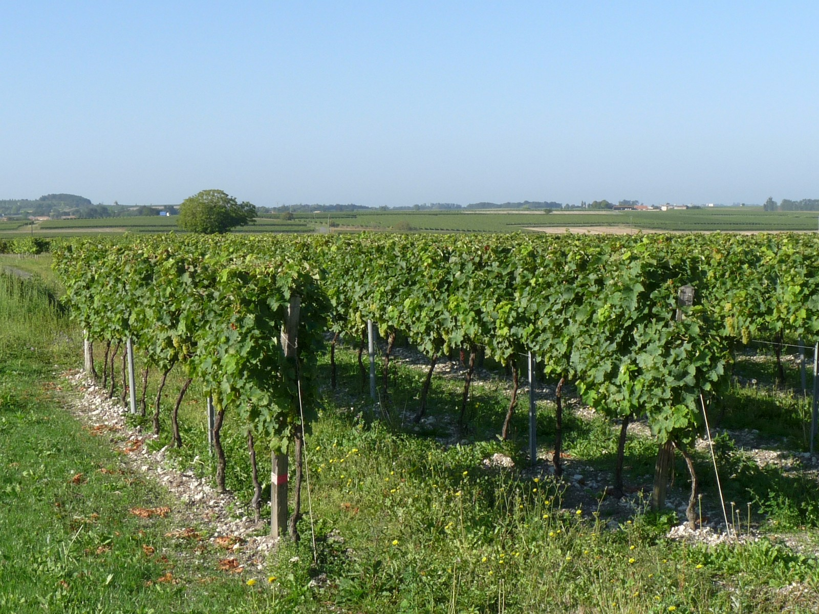 Le Peu Friaud, vue vers le sud-ouest, Pérignac, Charente-Maritime, France